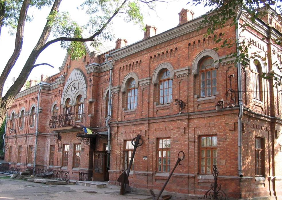 Обласний краєзнавчий музей у місті Миколаєві (серпень 2007)